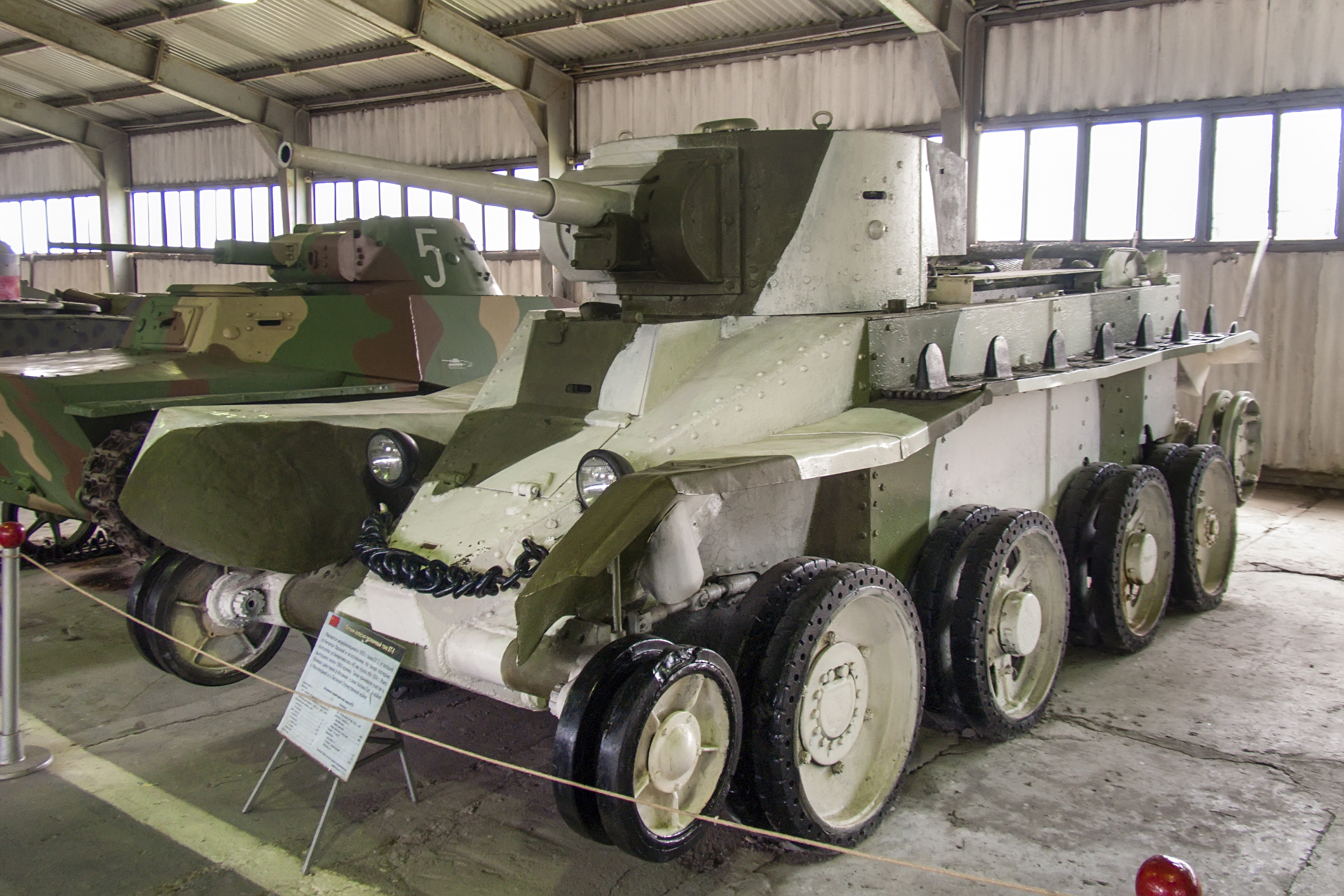 Легкий танк БТ-5 на колесном ходу в Центральном музее бронетанкового вооружения и техники в Кубинке.